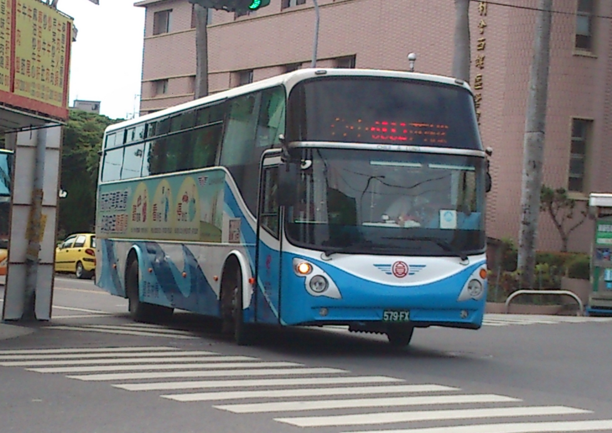 員林客運日野RK8JRSA大客車579-FX。